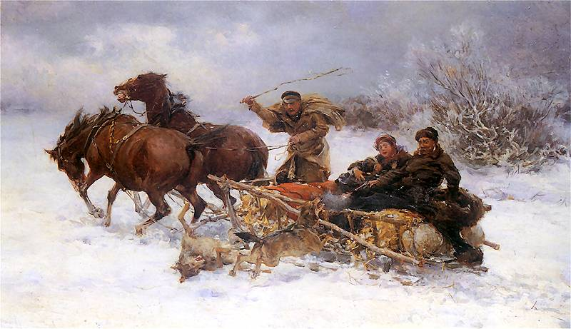 "Wilki napadające na sanie", Olej na desce. 20 x 31 cm, Oryginał: Własność prywatna. Uciekając przed wilkami, woźnica popędza zaprzęg batem, dzierży lejce, jeden z pasażerów się ostrzeliwuje, pasażerka osłania dziecko. "Wolves attacking a sleigh"